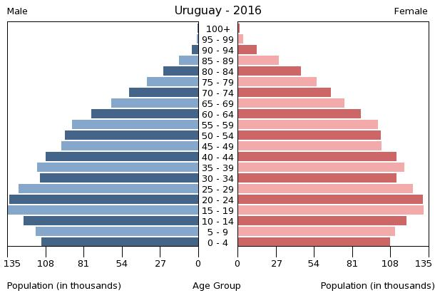 A population pyramid illustrates the age and sex structure of a country's population and may provide insights about political and social stability, as well as economic development. The population is distributed along the horizontal axis, with males shown on the left and females on the right. The male and female populations are broken down into 5-year age groups represented as horizontal bars along the vertical axis, with the youngest age groups at the bottom and the oldest at the top. The shape of the population pyramid gradually evolves over time based on fertility, mortality, and international migration trends.